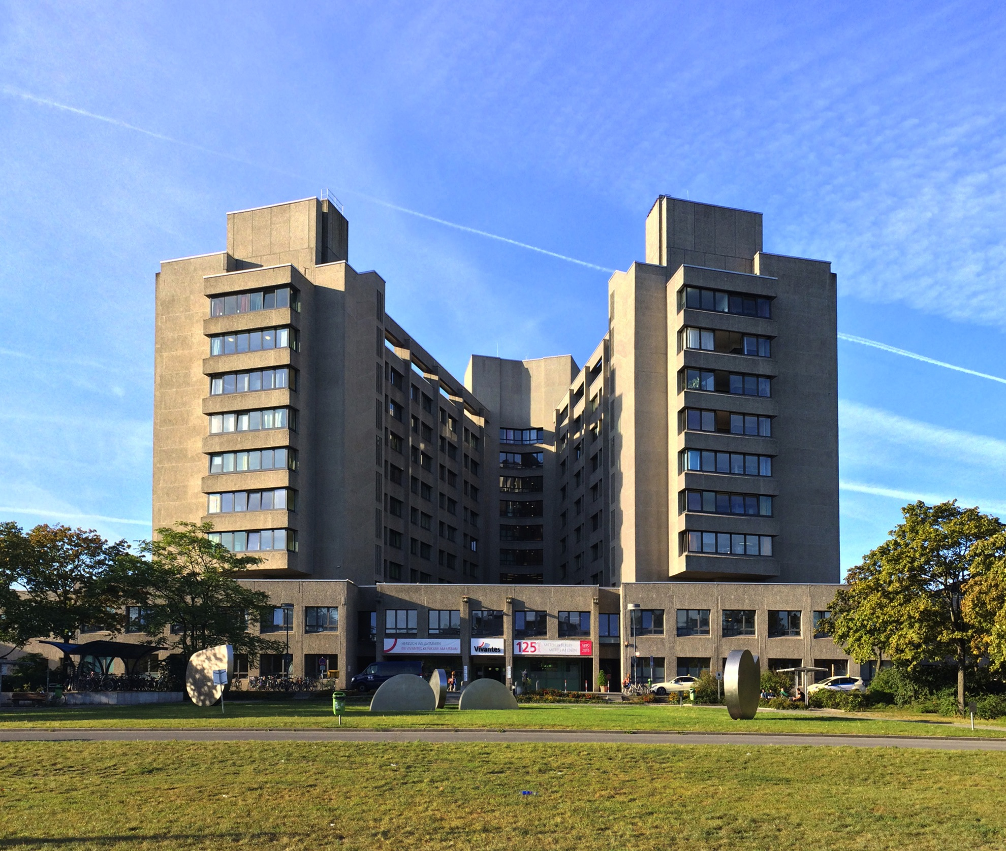 Urbankrankehaus/Klinikum am Urban, Berlin-Kreuzberg, 1966–1970, Peter Poelzig, Friedrich Bock, Cornelius Hertling, Gerd Zabre, Aufnahme September 2016